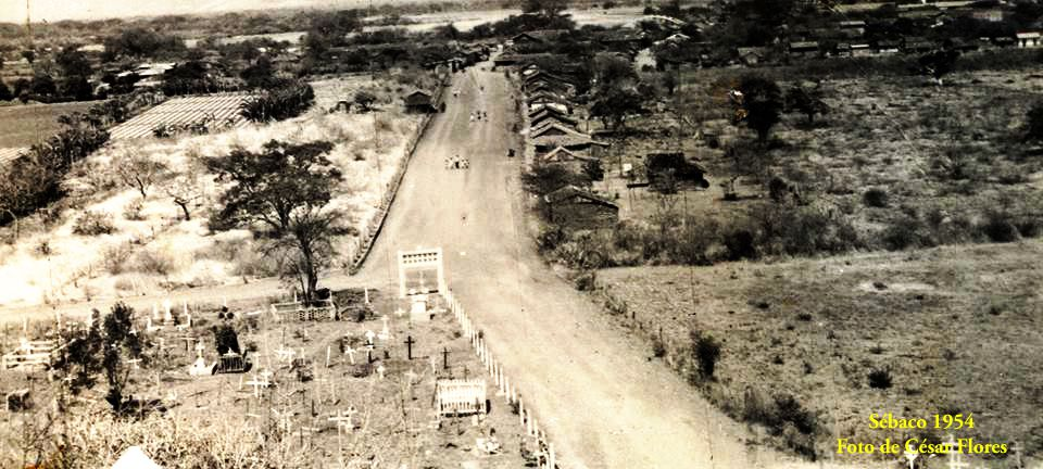 Sébaco en la década de 1950 (Foto del señor César Flores